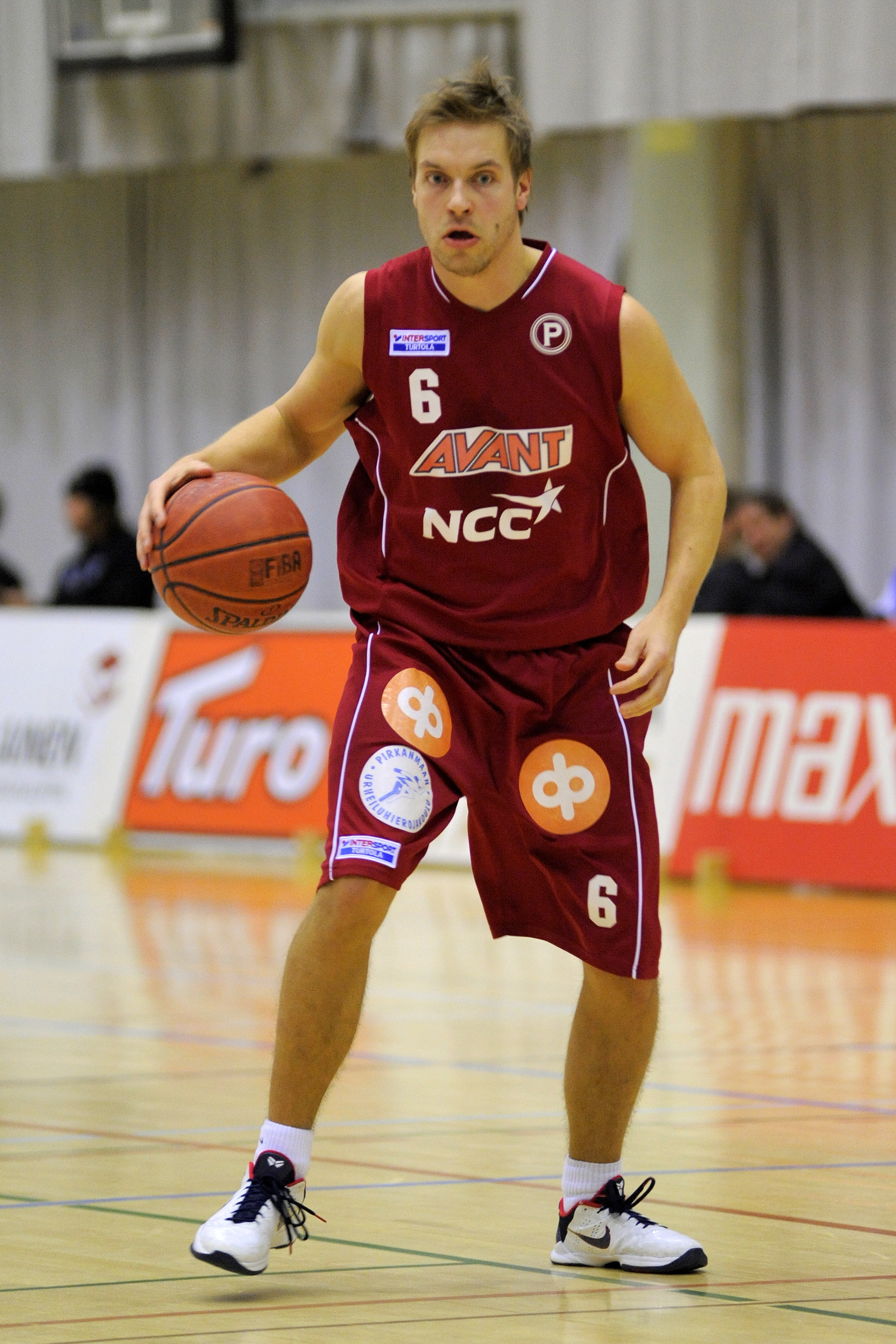 Koripalloilija Joni Harjula 26.1.2011 ottelussa Lappeenrannan NMKY - Tampereen Pyrintö.